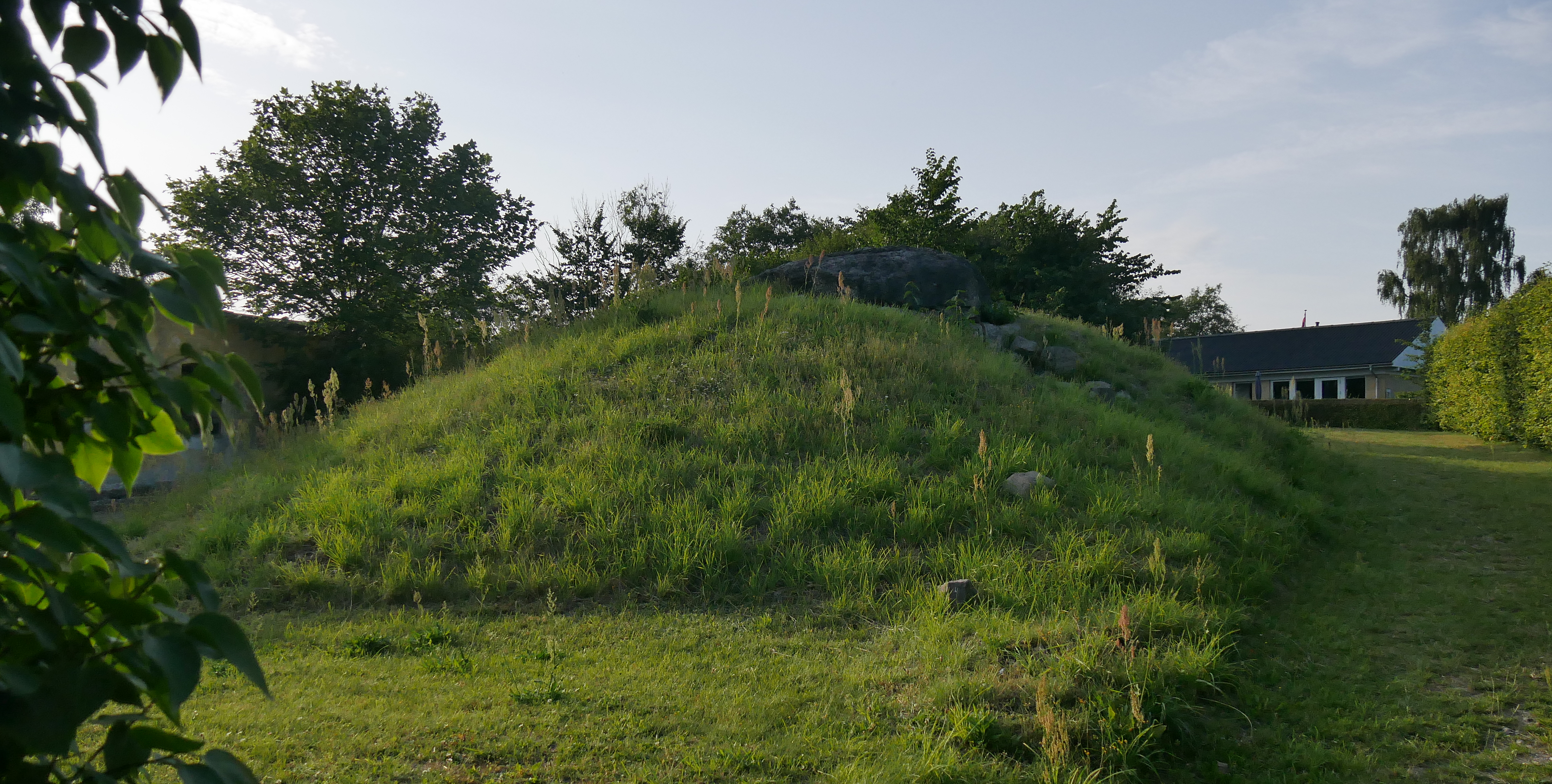 Der Dolmen von Ellidshøj (dänisch auch Ellehøj oder Ellenhøj genannt) liegt mitten in der zu Aalborg gehörenden Gemeinde Ellidshøj in Himmerland im nördlichen Jütland, 15 km südlich von Aalborg in Dänemark. Das Großsteingrab stammt aus der Jungsteinzeit, etwa 3500–2800 v. Chr., und ist eine Megalithanlage der Trichterbecherkultur (TBK). - Es ist ein großer Nordost-Südwest-orientierter Polygonaldolmen[2] mit einer 3,2 m langen, aus acht Tragsteinen und einem Deckstein gebildeten achteckigen Kammer. Der Deckstein ragt oben und vorne aus dem seiner Einfassung beraubten Rundhügel heraus. Er ist 3,45 m lang, 2,2 m breit und 1,3 m hoch. Alle Steine des Ganges fehlen. Der Zugang zum Dolmen ist 0,6 m breit. Die Anlage wurde 1941 restauriert.